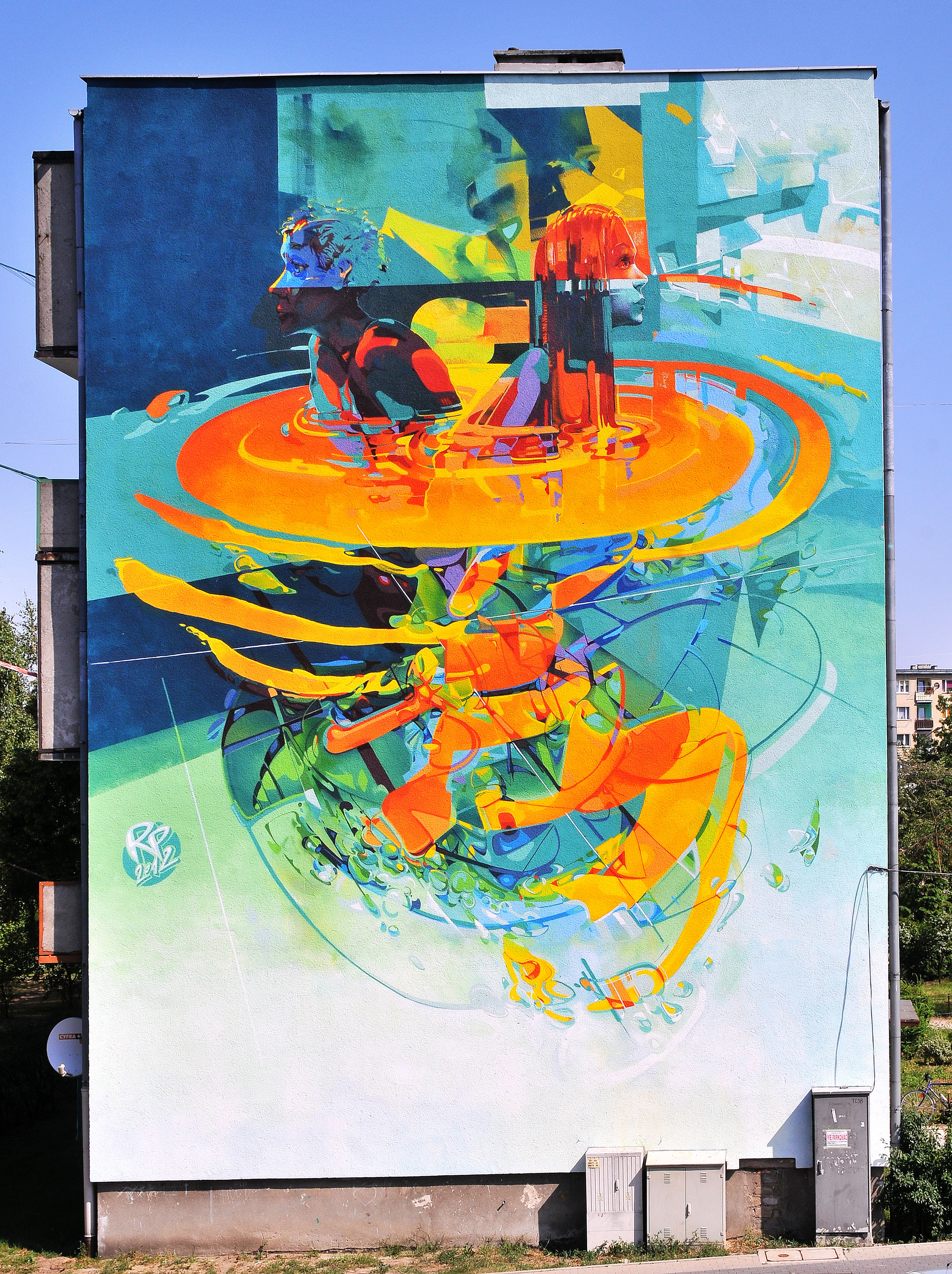 Mural autorstwa Roberta Procha, znajdujący się przy ul. P.O.W. w Turku, który został utworzony podczas Festivalu SCABB 2012